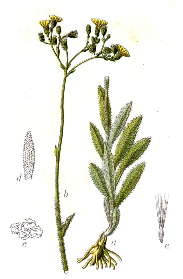 Hieracium echioides Lumn. Original Caption Borstiges Mauseohr, Hieracium echioides